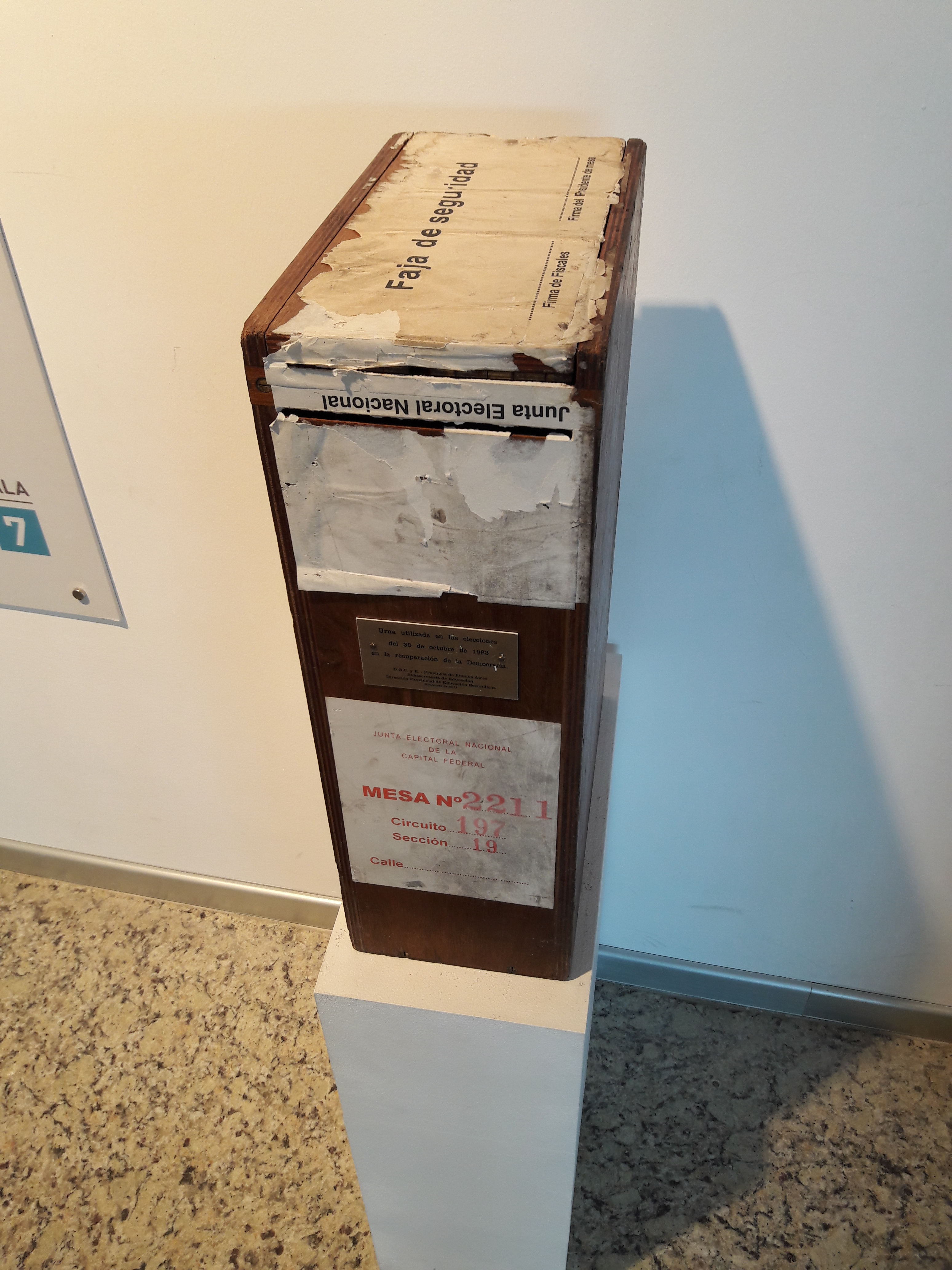 Urna electoral de 1983, la vuelta a la democracia. Museo Malvinas, Núñez, Buenos Aires, Argentina.